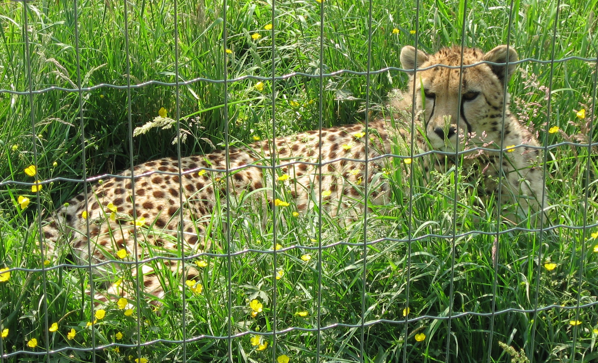 Acinonyx jubatus in Parc des Félins (Guépard) Map: 48° 42' 31" N 2° 57' 20" E